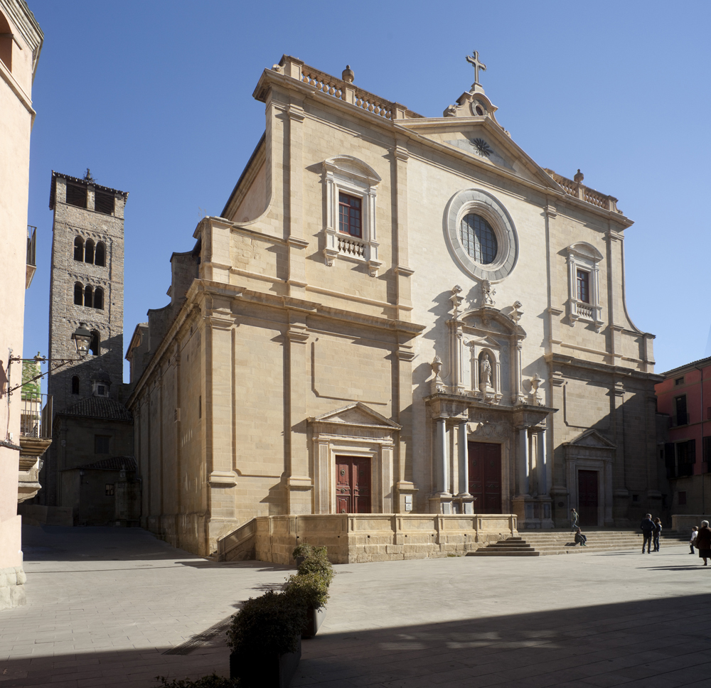 Cultural Heritage Spain